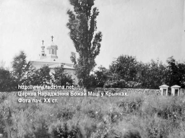 Беларуская (тарашкевіца): Крынкі (Krynski). Багародзіцкая царква-мураўёўка